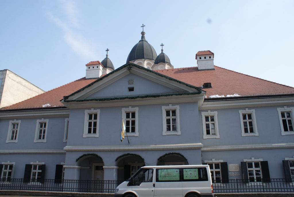 Casa cu arcade (Lábasház)